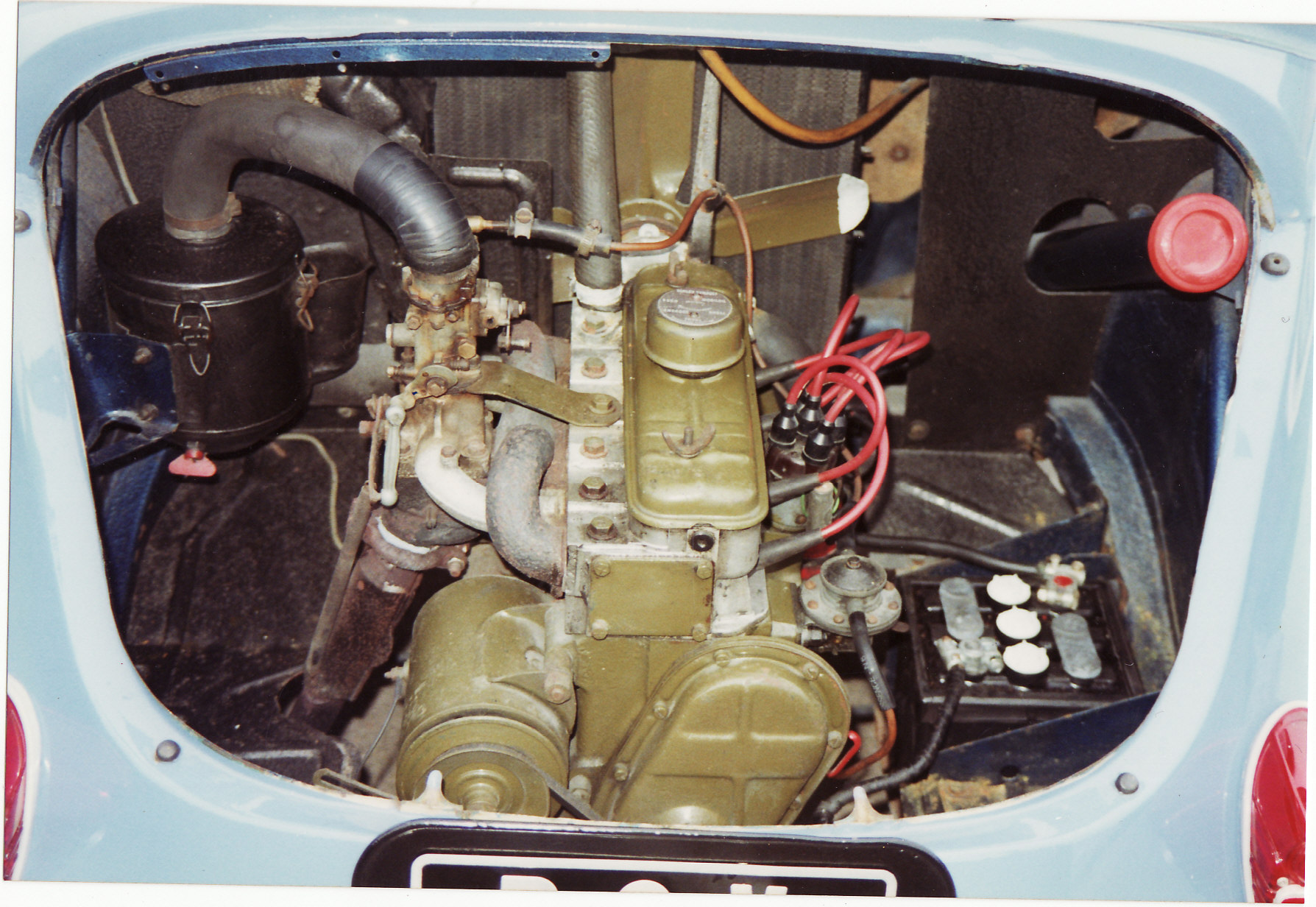 My classic car 1992-1994. 750cc.